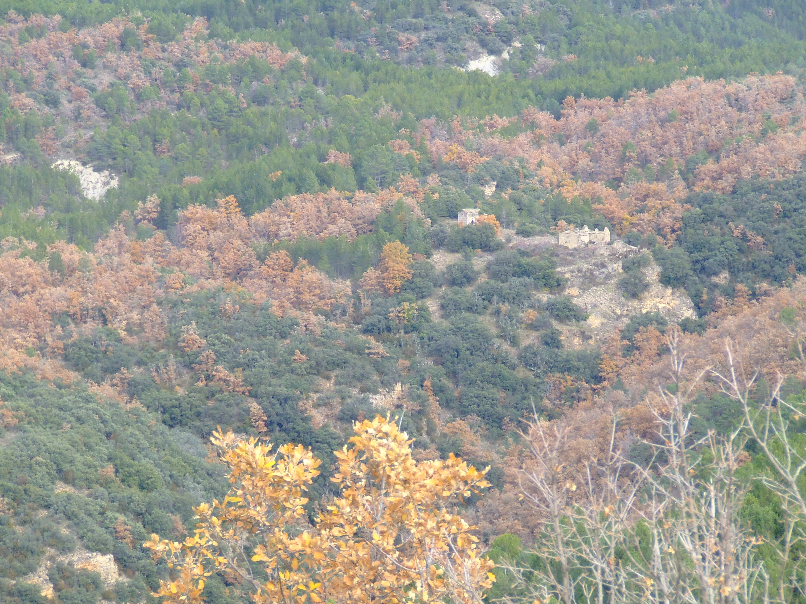 El Mullol, de Siall (Isona, Isona i Conca Dellà, Pallars Jussà)